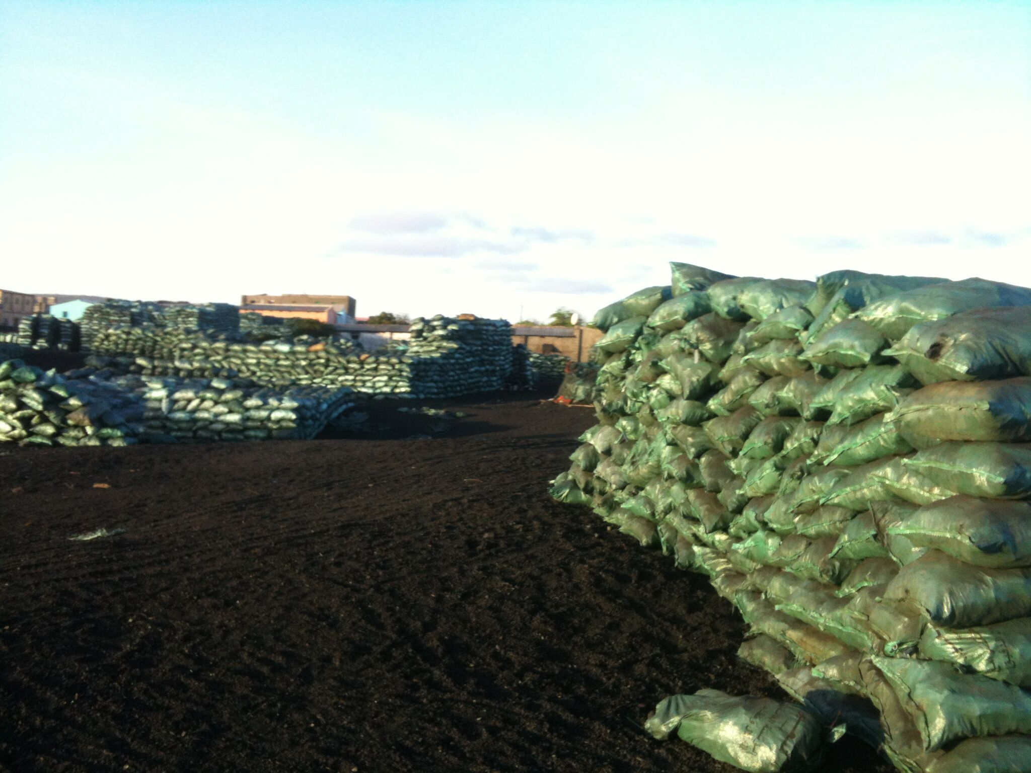 Soomaaliga: baraawe dhuxul la rarayo